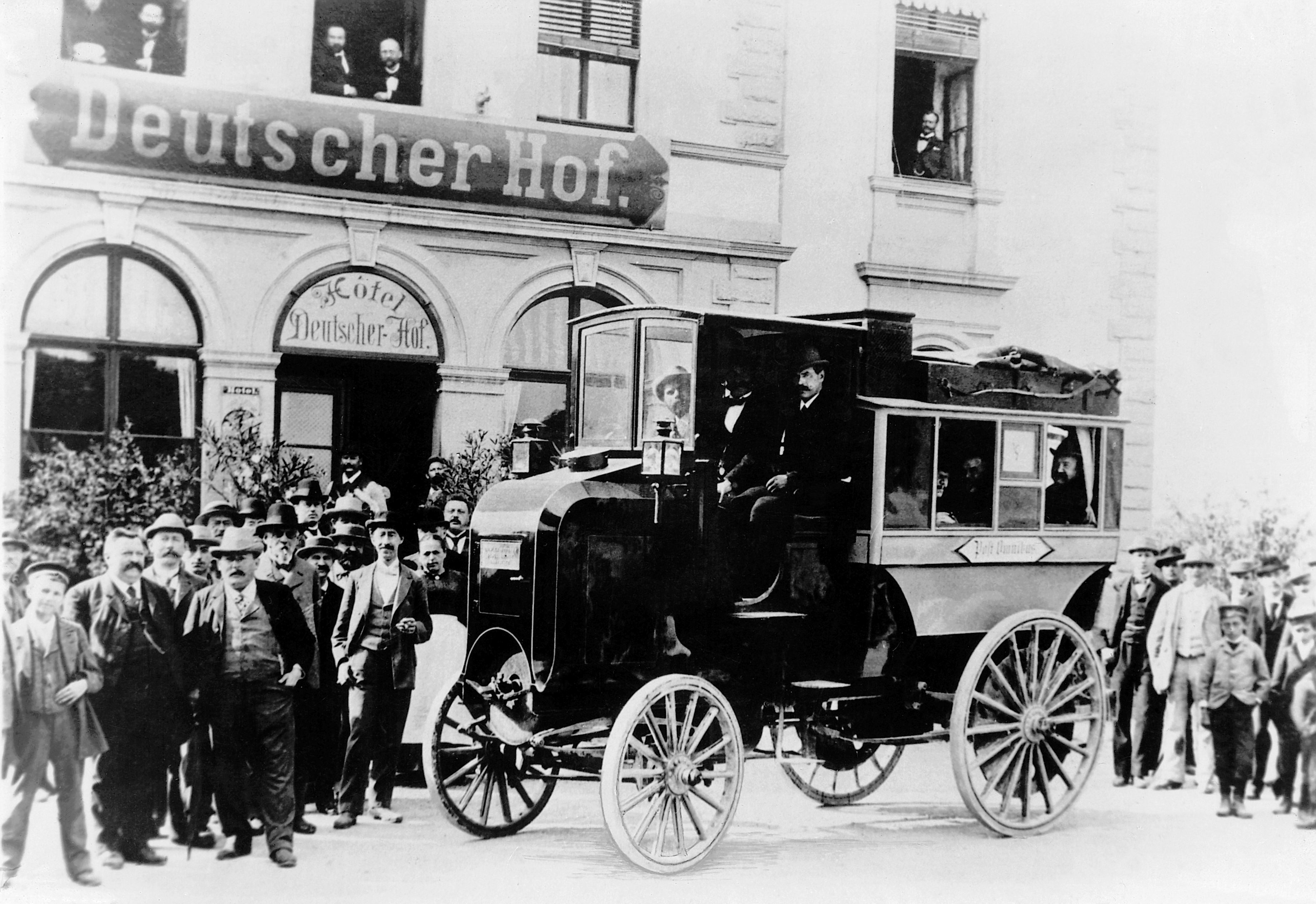 Post-Omnibus der Daimler-Motoren-Gesellschaft, betrieben von der Motorwagen-Gesellschaft Künzelsau-Mergentheim GmbH im Auftrag der württembergischen Post, vor dem Deutschen Hof in Bad Mergentheim.